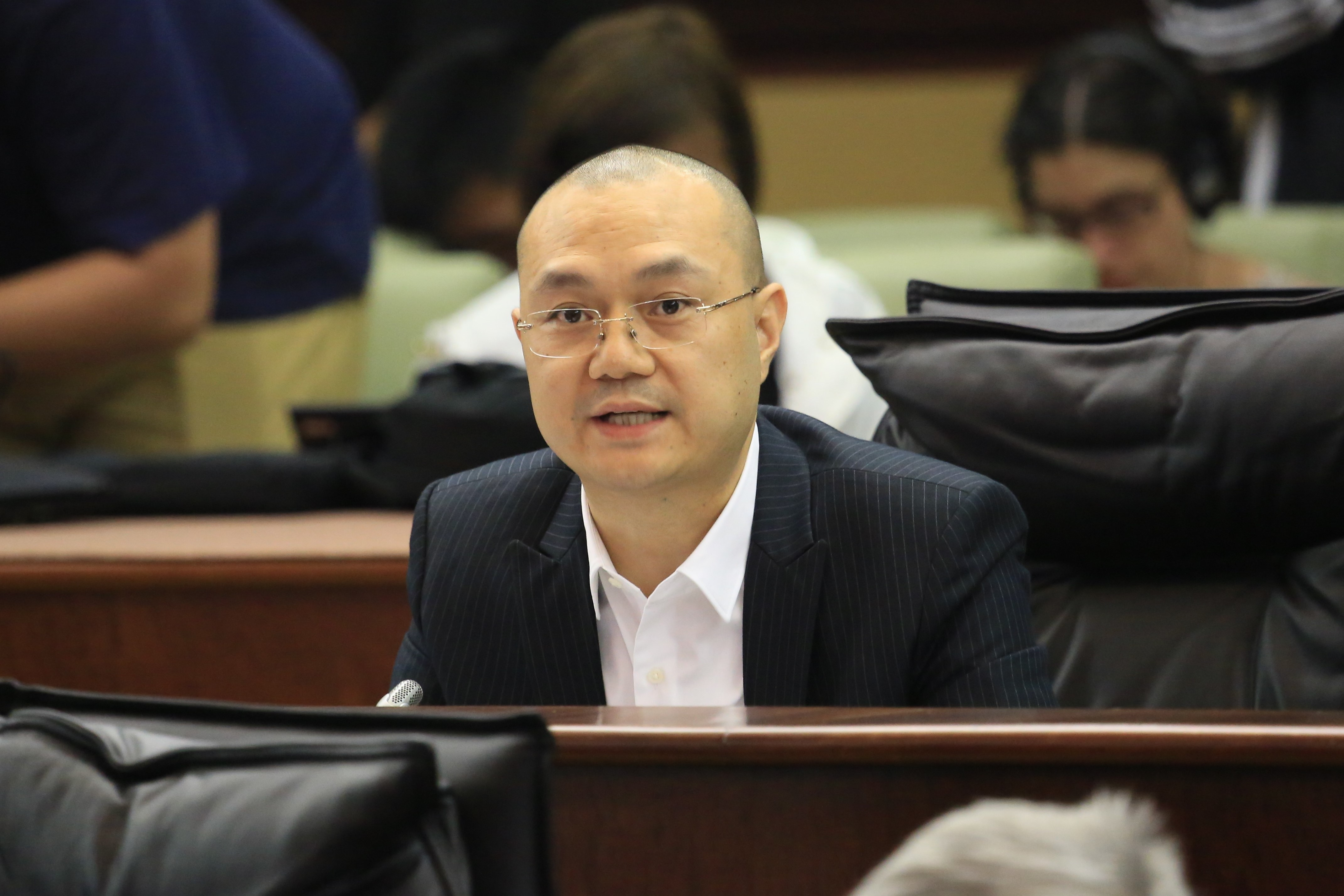 澳門特別行政區立法會議員施家倫